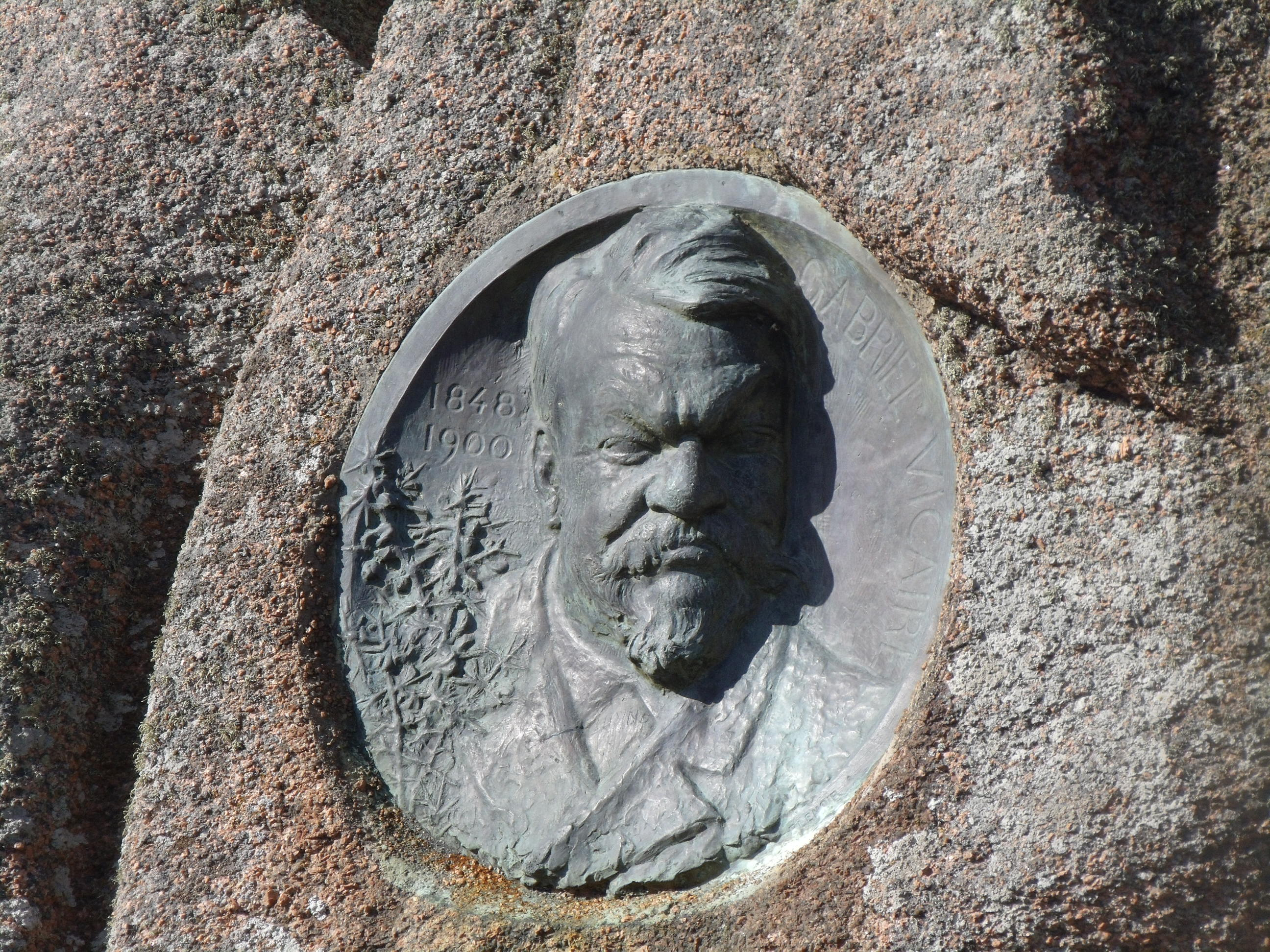 Le médaillon posé en 1910 à La Clarté